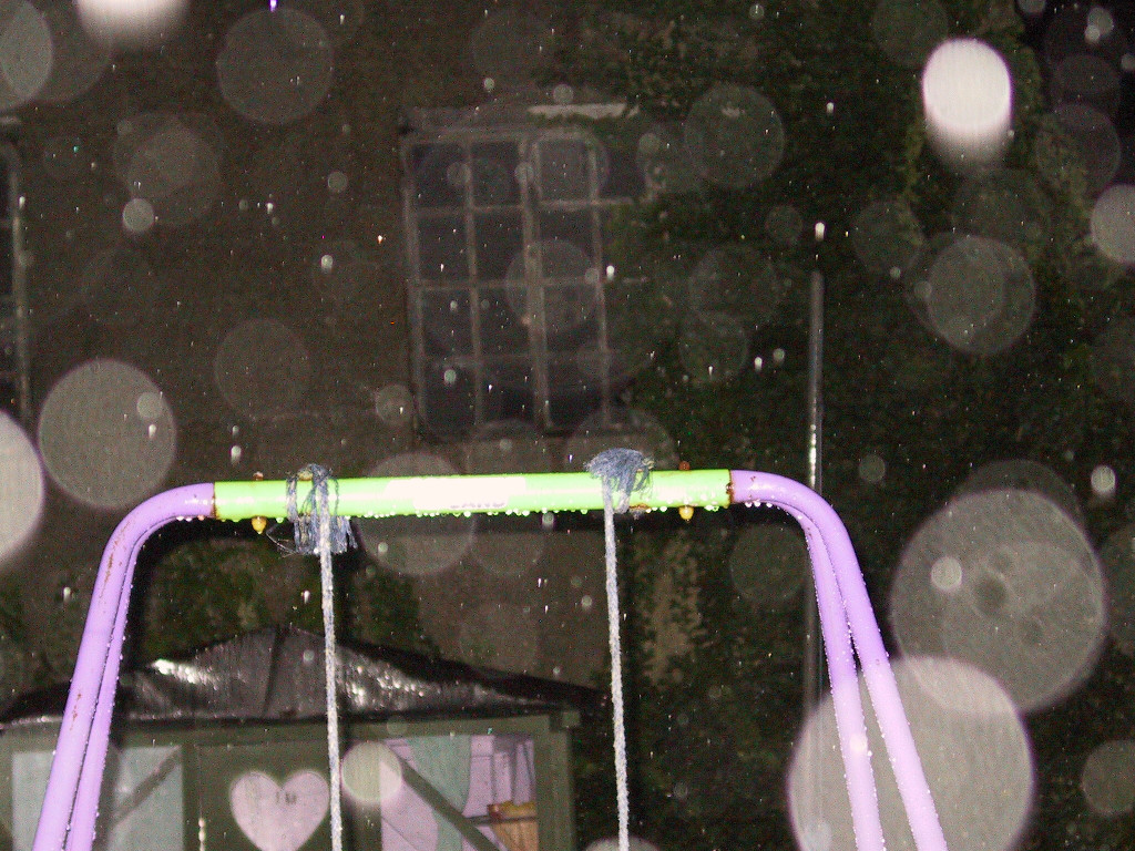 Rain Orbs - Camera zoomed in